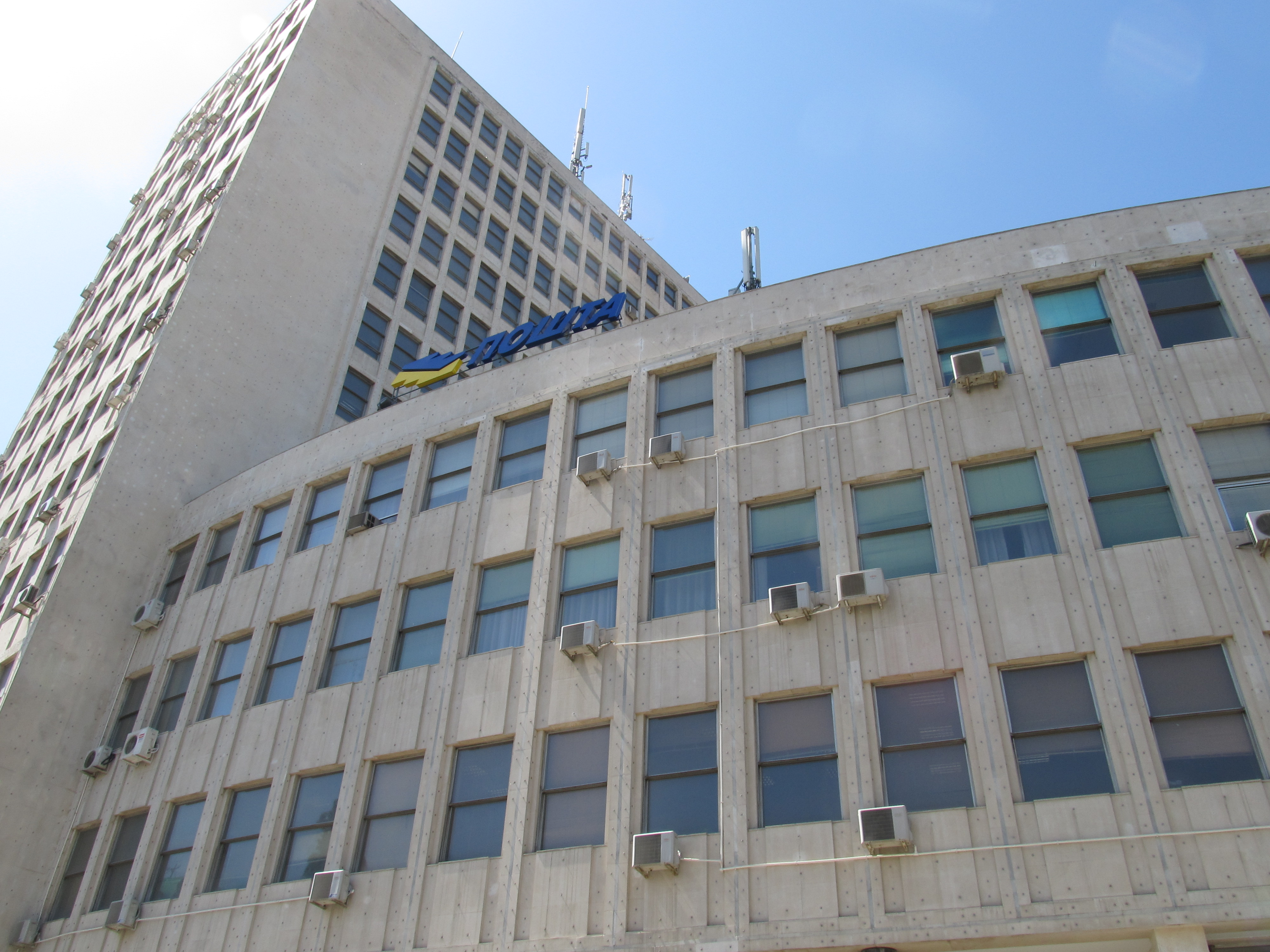 Zgrada glavne pošte u Novom Sadu. Početkom sedme decenije XX veka Novi Sad dobija poštansku palatu, urađenu prema projektu arhitekte Dragiše Brašovana. Reč je o impresivnoj građevini, koja podseća na beogradsku palatu “Albanija”. Ovo zdanje čudnog položaja u odnosu na ulične regulacije postavljeno je tako da bi se “uglednim zvanicama” iz Beograda zaklonio pogled na sinagogu.